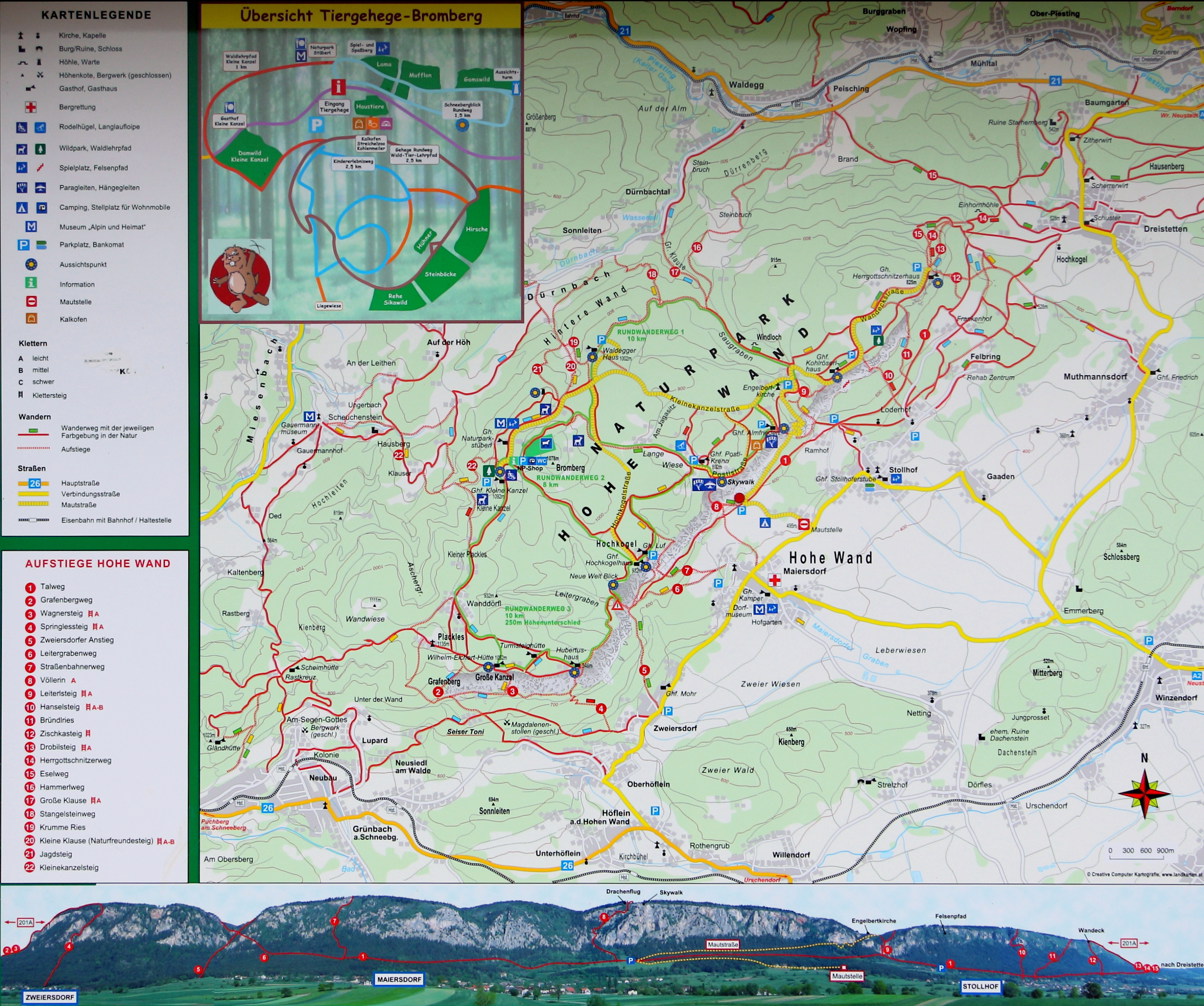 Übersichtskarte (Aufstiege) des niederösterreichischen Naturparks Hohe Wand. Ein Ausschnitt des fix montierten und öffentlich zugänglichen Informationsstandes beim Sonnenuhr-Parkplatz nächst Stollhof.